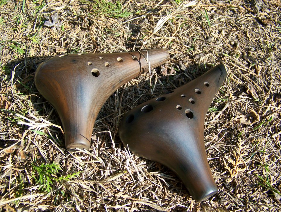 12 lyukú alto C okarínák. Készítő: Erős Ádám (Cinege)